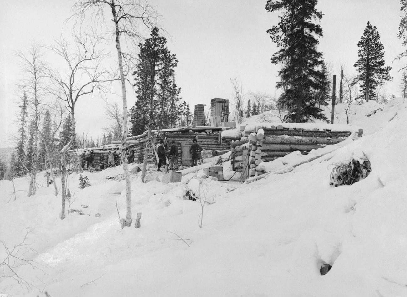 DIG2984. Porjus kraftverk. De första arbetarbostäderna.Fotografiet är skänkt till Tekniska museet från Svenska Turistföreningen.